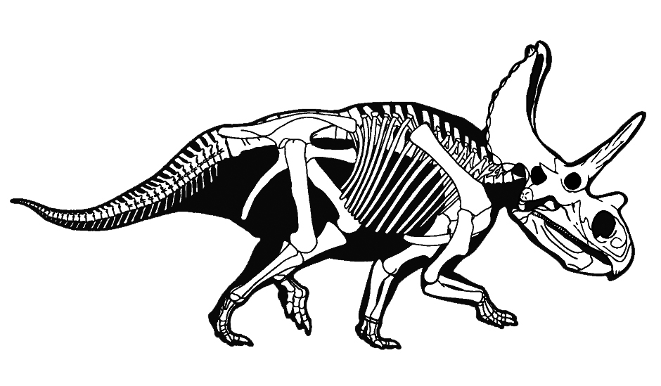 Agujaceratops skeletal restoration.